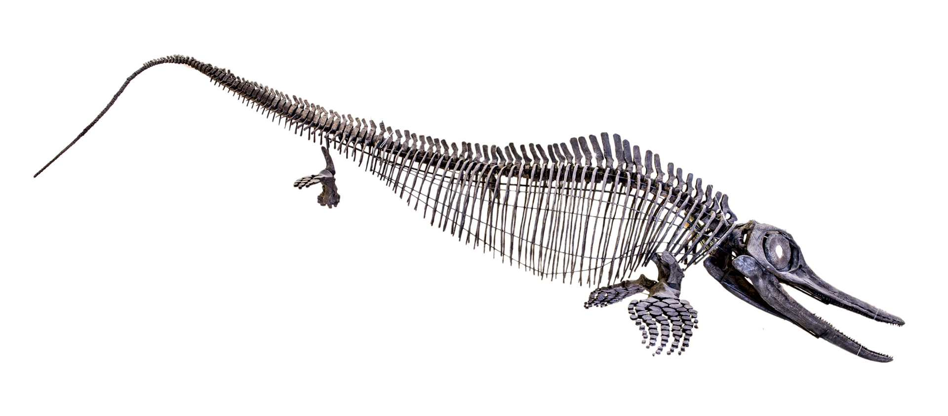 Replica.